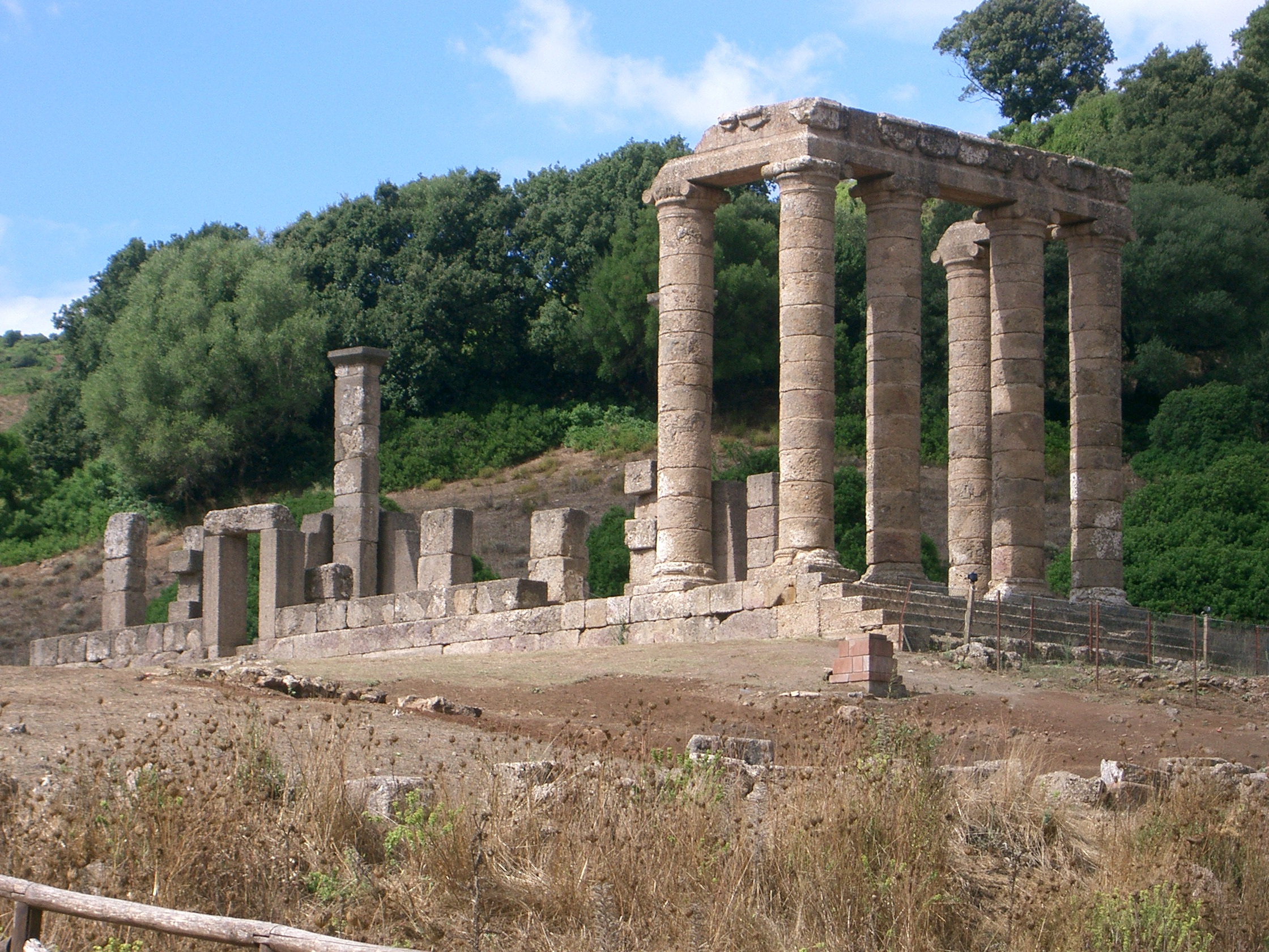 Antas temple near Fluminimaggiore, Sardinia, Italy.